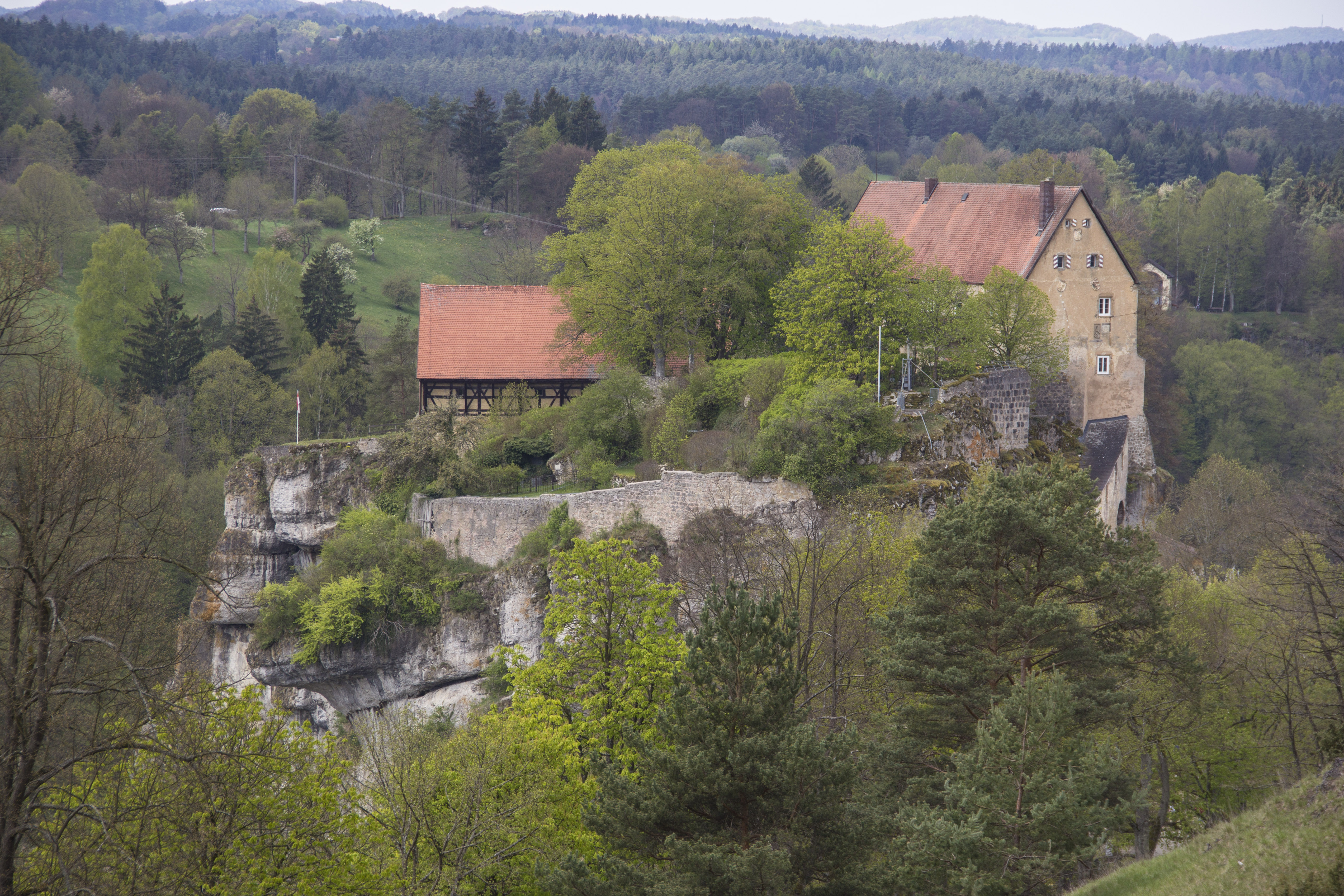 Nationales Geotop Pottenstein, Naturpark Fränkische Schweiz-Veldensteiner Forst